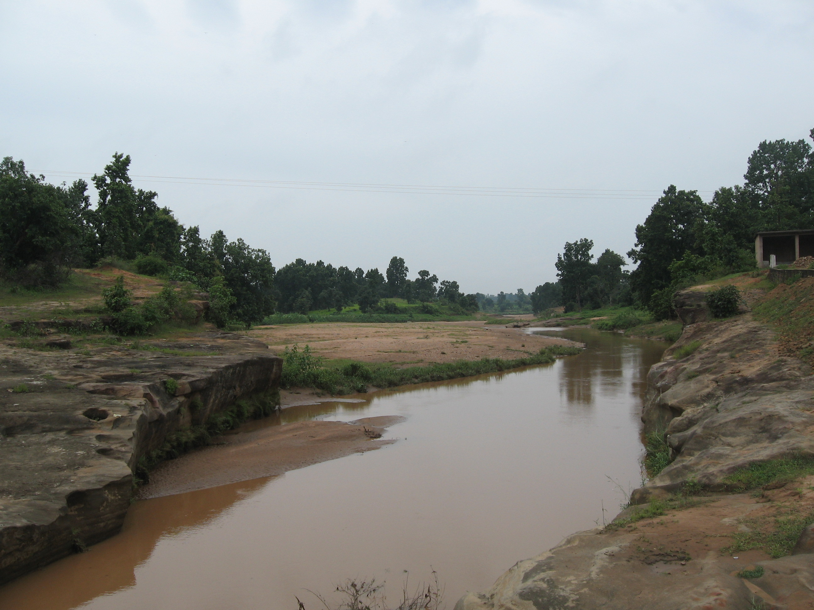 Dugadugi river in McCluskieganj